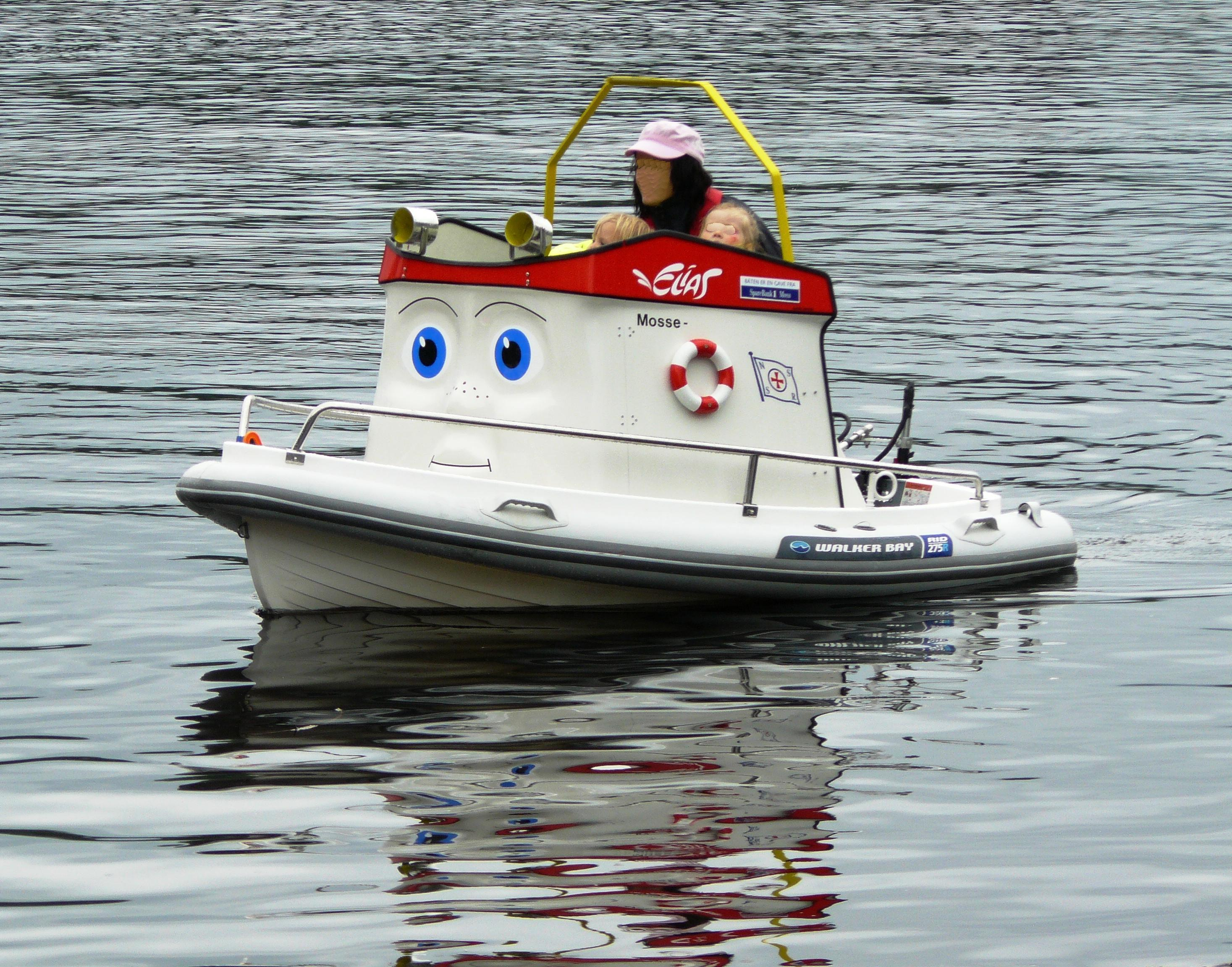 Kids motorboats